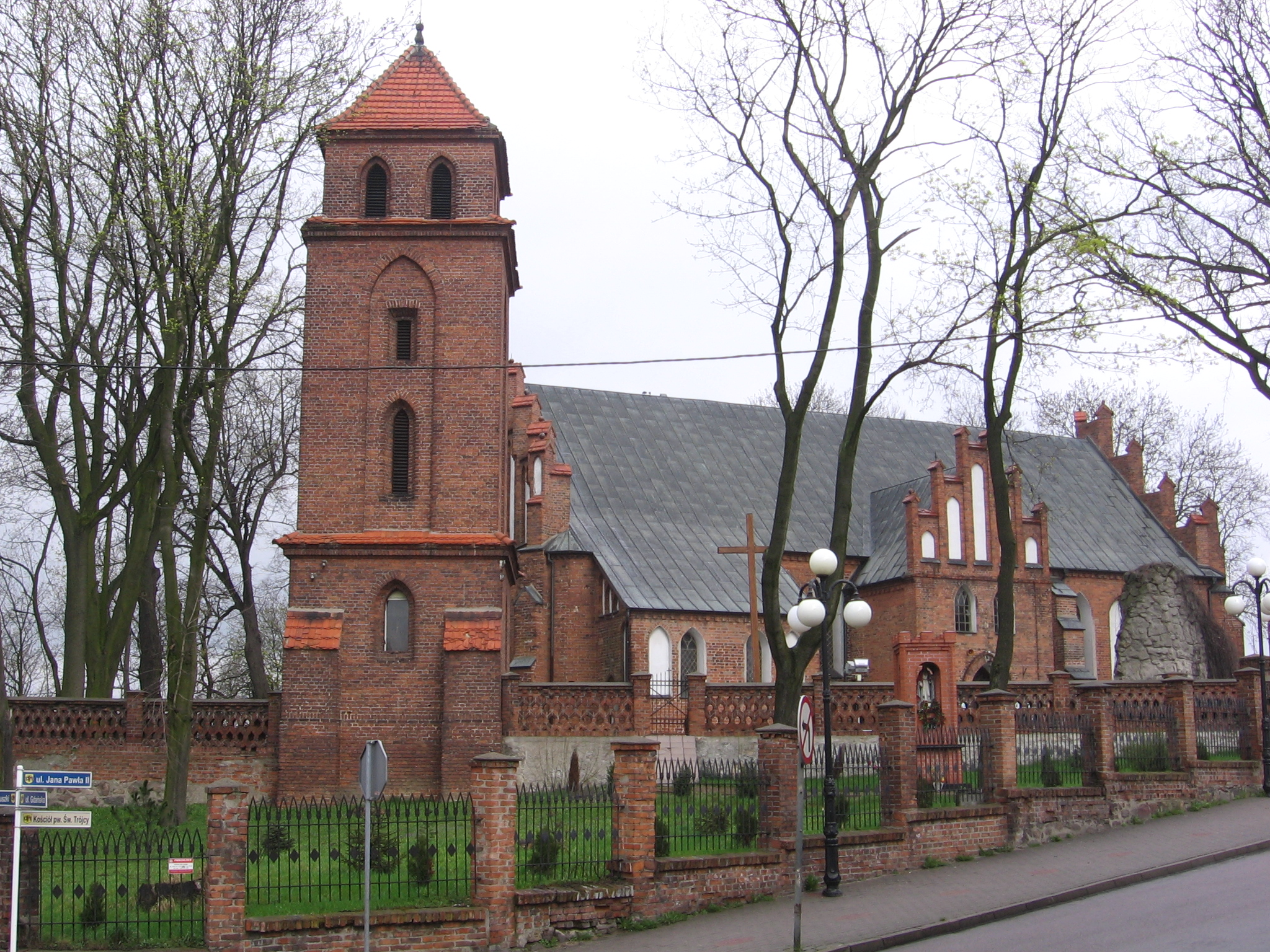 Kościół Św. Trójcy w Rypinie na Pomorzu